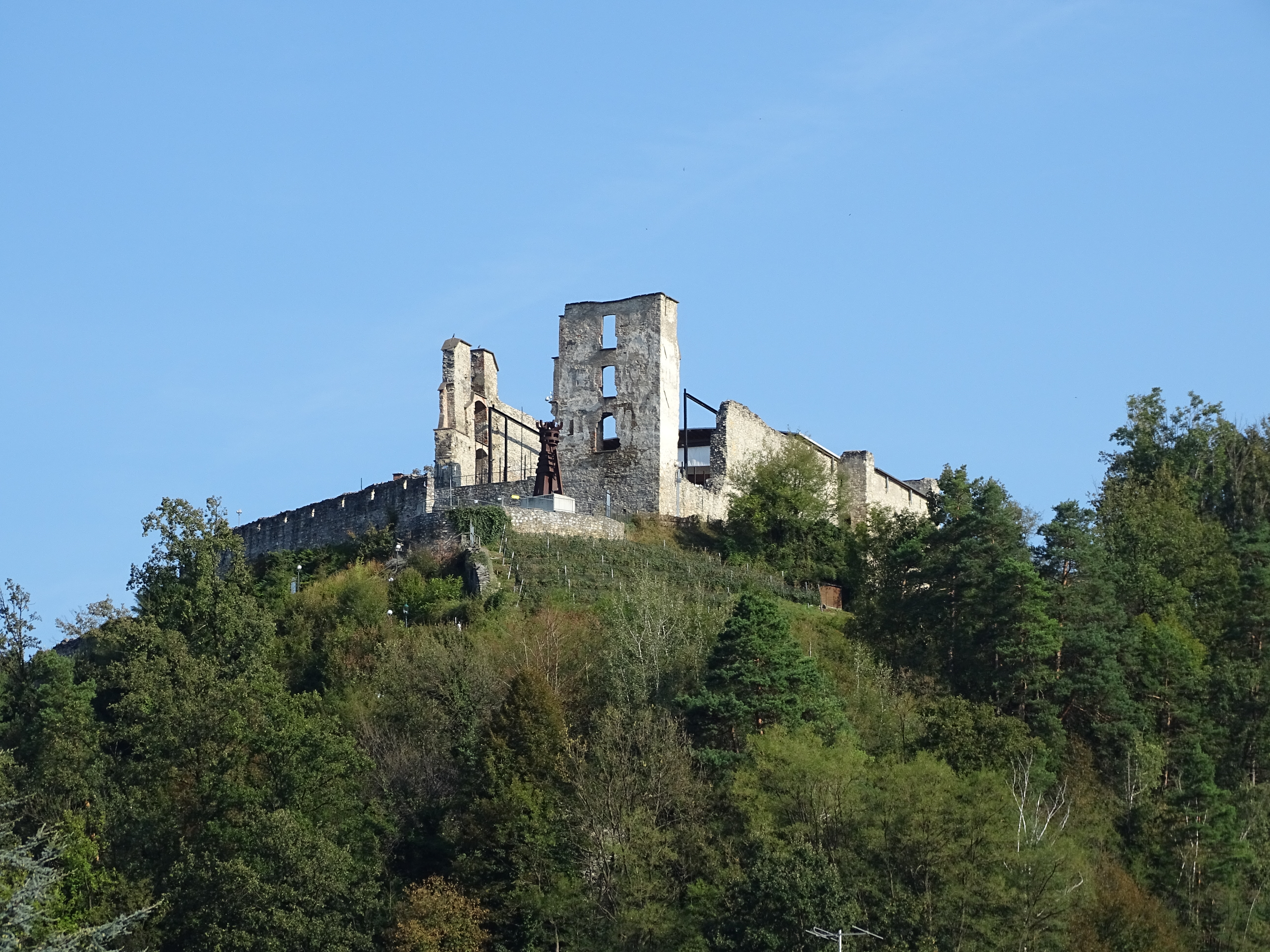 Burgruine Obervoitsberg